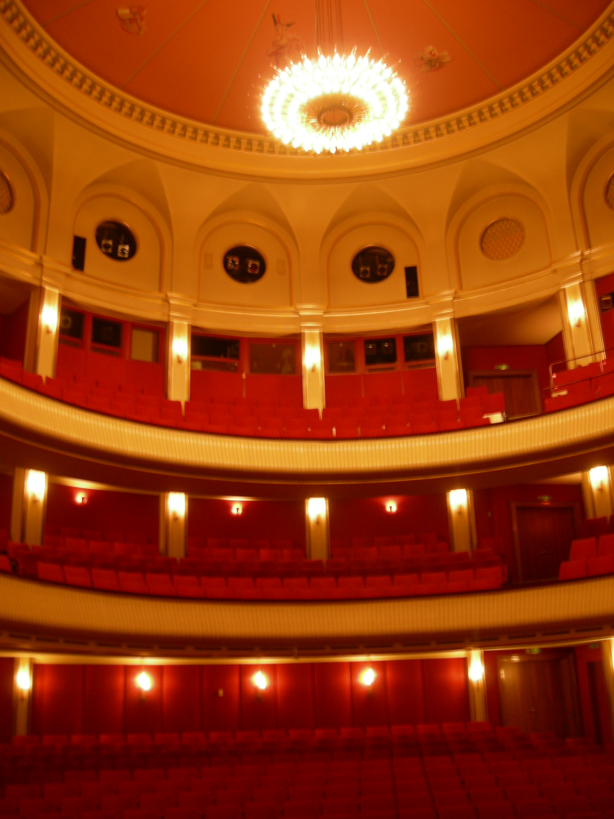 Stadttheater Schaffhausen, Zuschauerraum